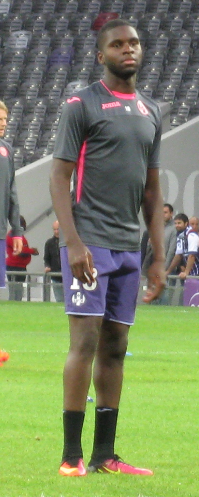 Odsonne Édouard, attaquant an prêt au TFC, à l'échauffement au Stadium de Toulouse lors du match Toulouse FC-EA Guingamp comptant pour la 5ème journée de la saison 2016-2017de Ligue 1.